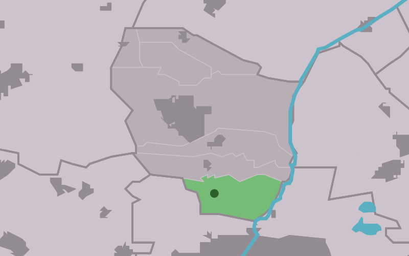 Kaartsje fan himrik fan Jelsum